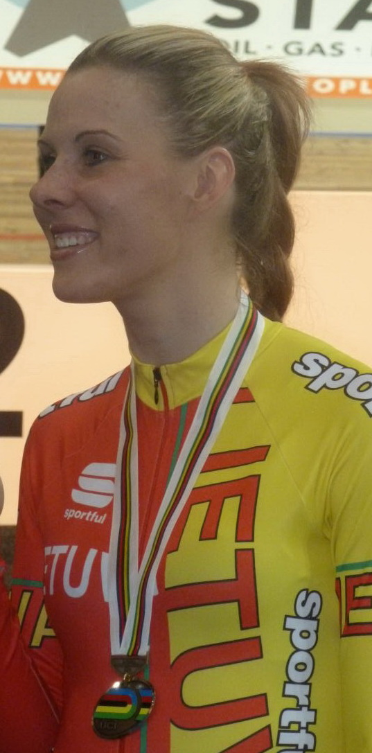 Vilija Sereikaitė, litauische Radrennfahrerin